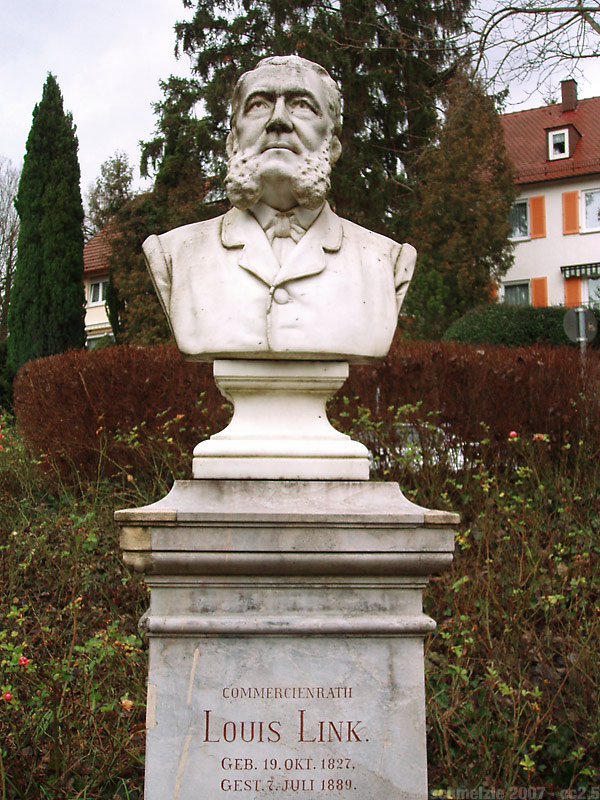 Louis-Link-Büste beim Katharinenstift in Heilbronn. Link war Stifter des Katharinenstifts.